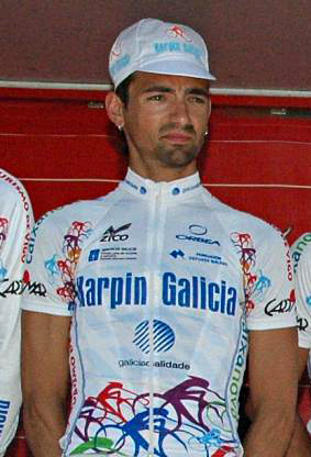 Alberto Fernández Sainz. Karpin-Galicia, Euskal Bizikleta 2008